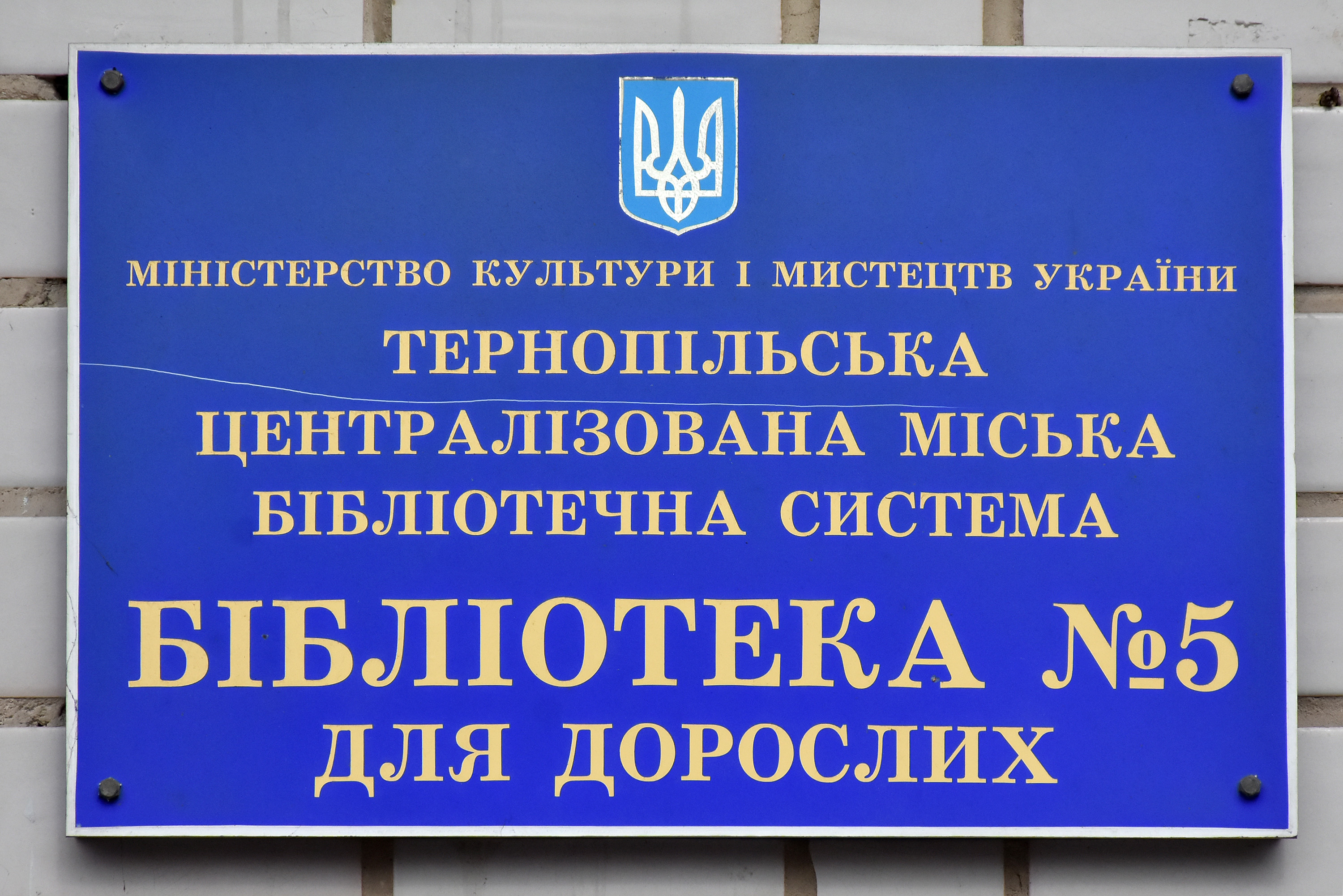 Бібліотека № 5 для дорослих Тернопільської міської централізованої бібліотечної системи.